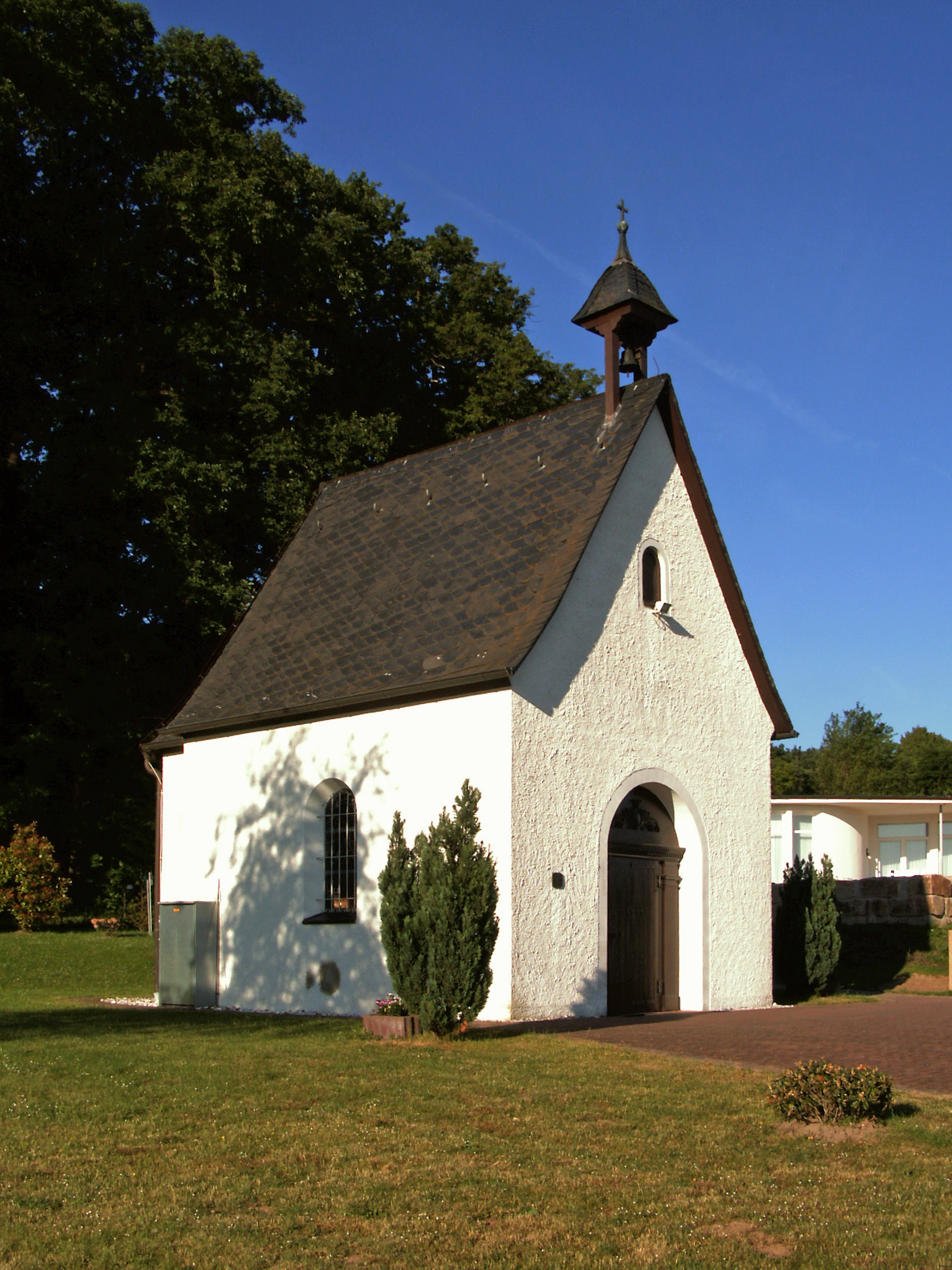 Katholische Schönstattkapelle auf dem Gertrudenberg bei Bad Salzdetfurth, Bistum Hildesheim